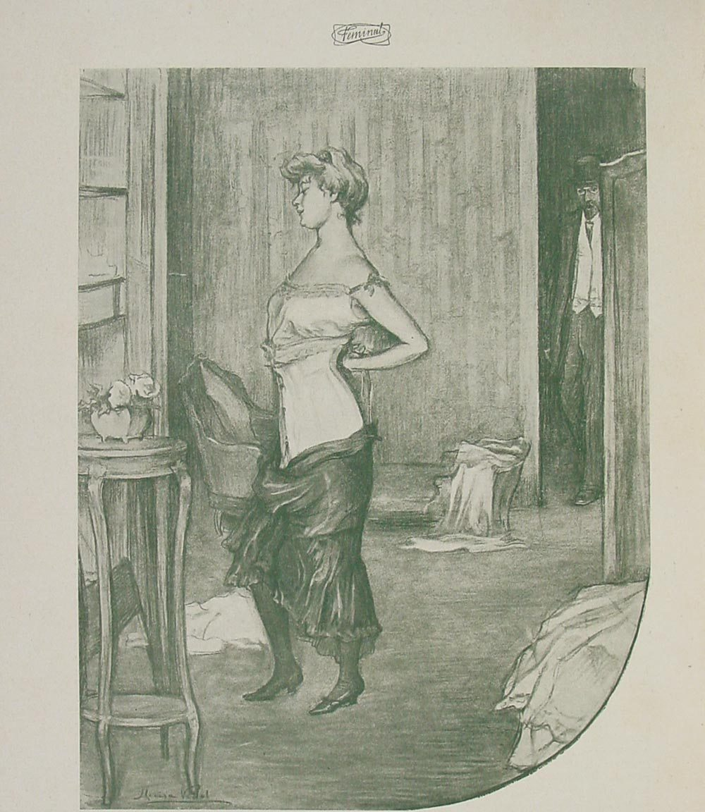 Il·lustració de Lluïsa Vidal. Feminal, n. 43, 1910